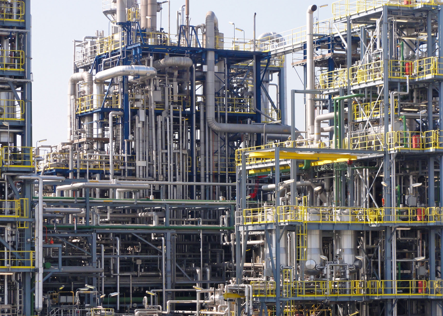 Chemie Park Delfzijl